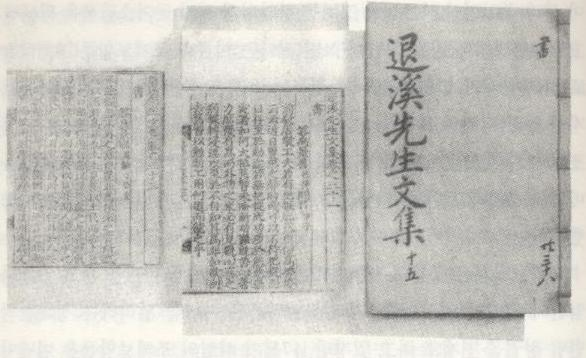 퇴계 이황의 문집